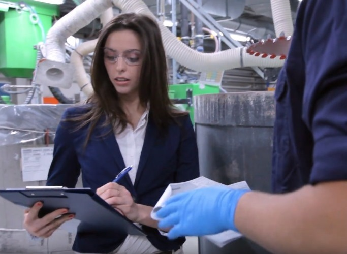 Műszaki menedzser közös nyelvet